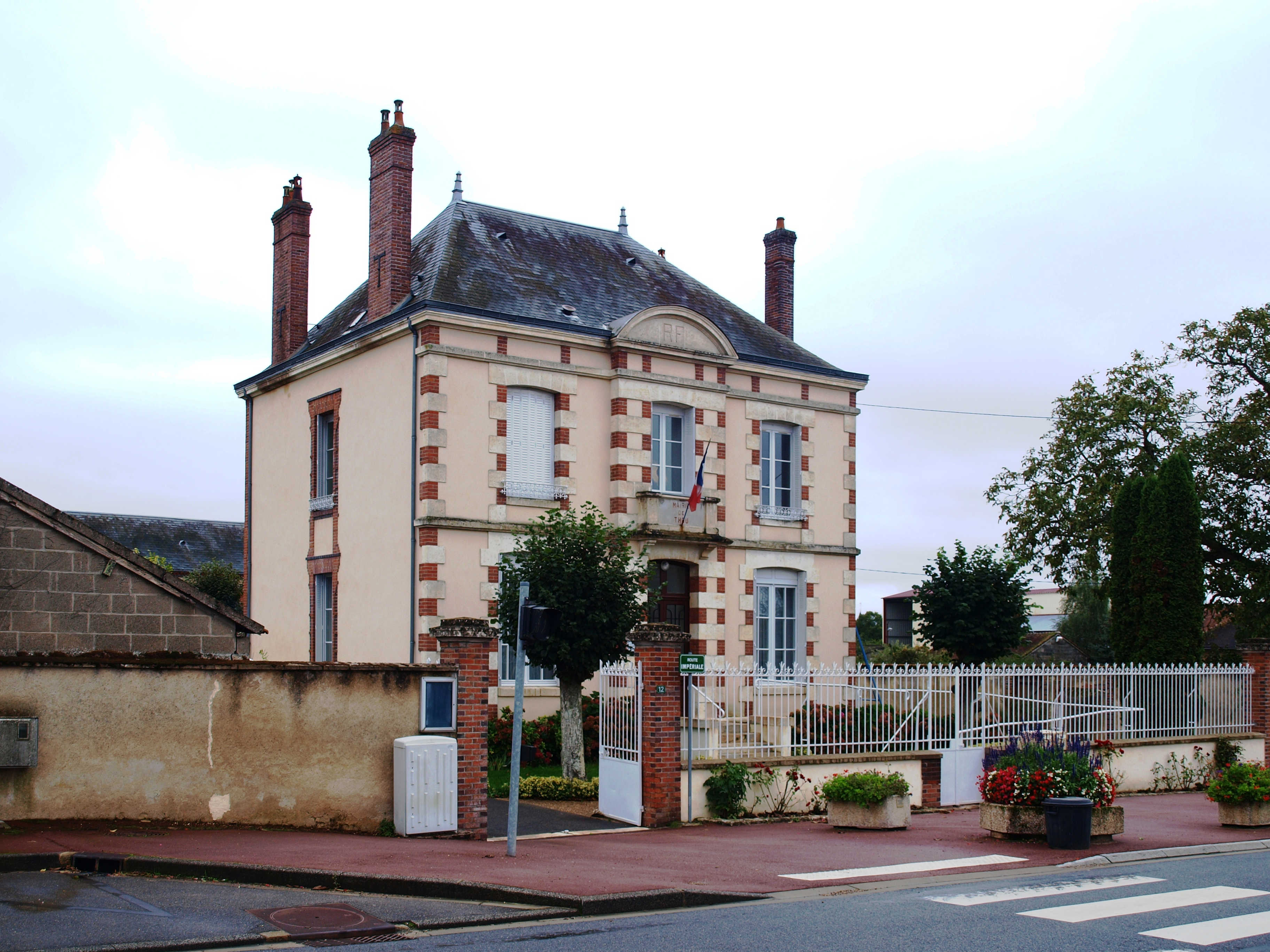 Thou (Loiret, France) ; mairie.